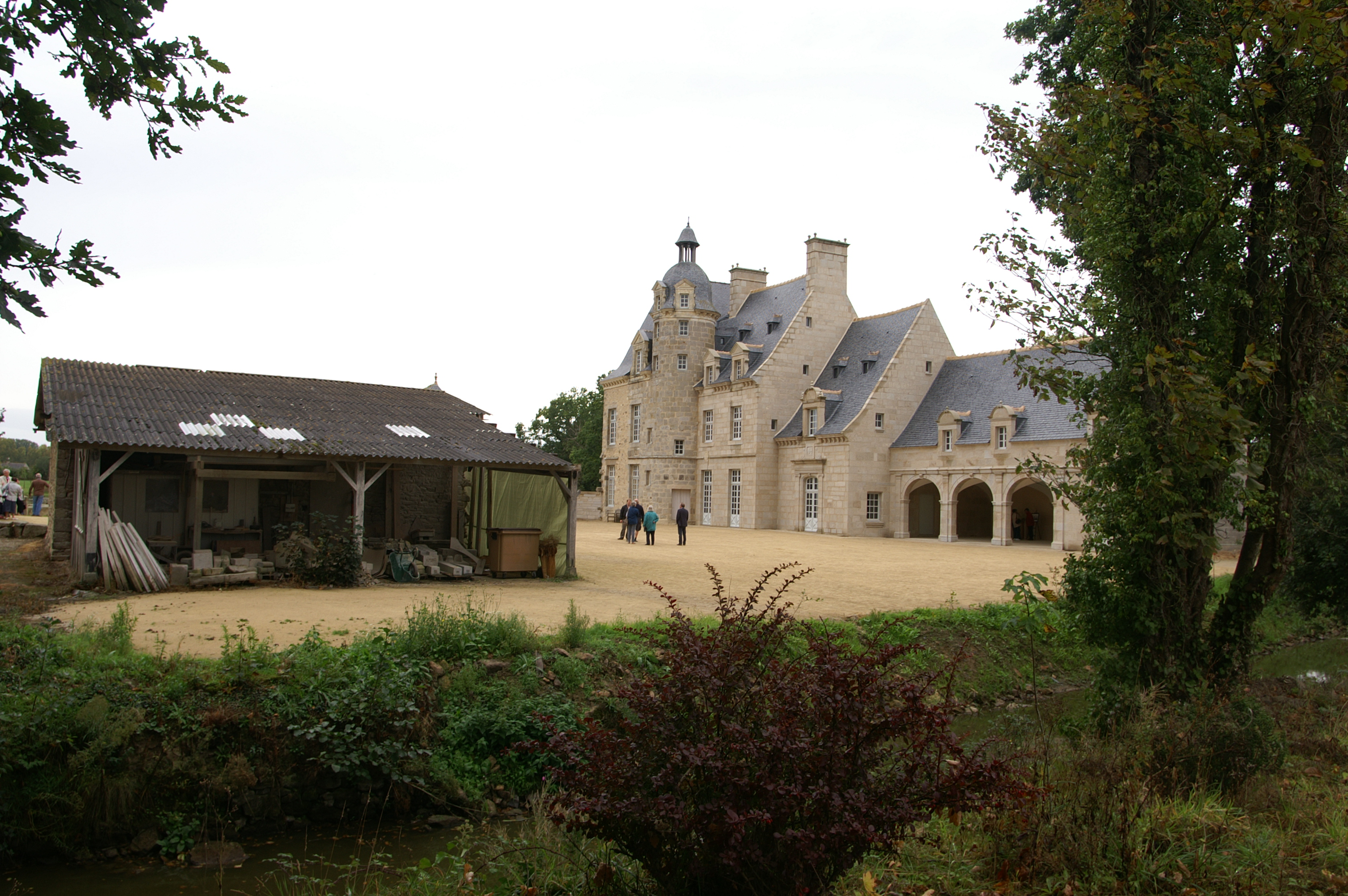 Manoir de la Coudraie à Ploubalay